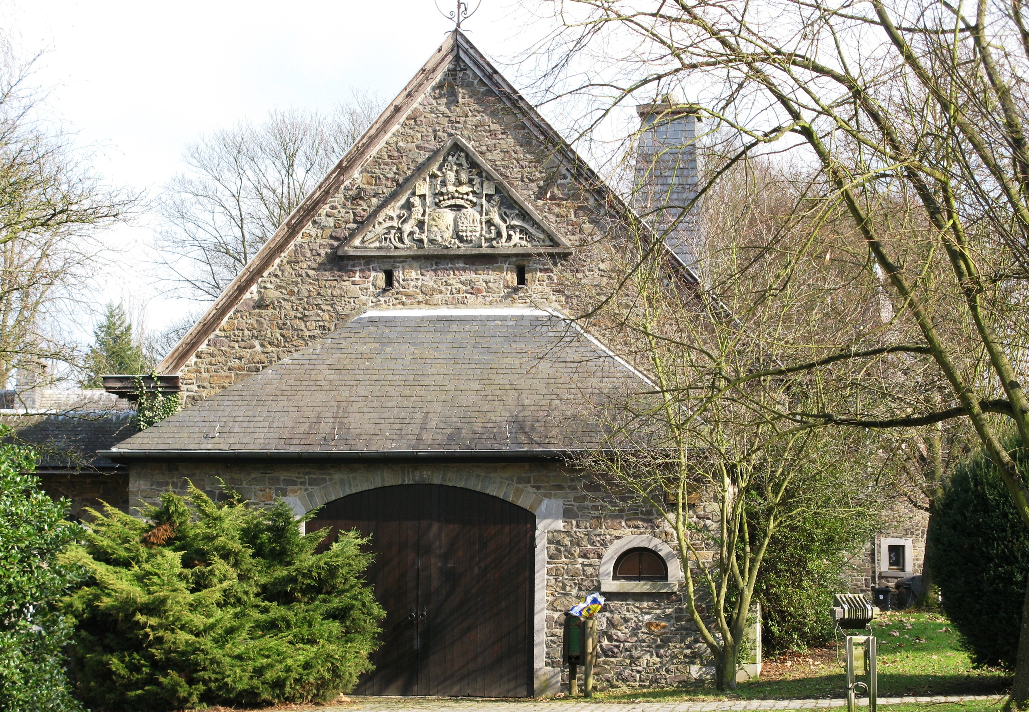 Westsäit vum Beiemusée vun Tilff.